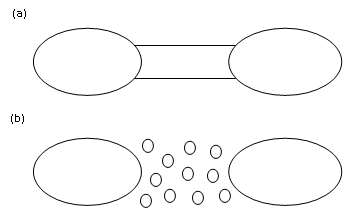 habitats conectados por corredor (a) o por parches (b)